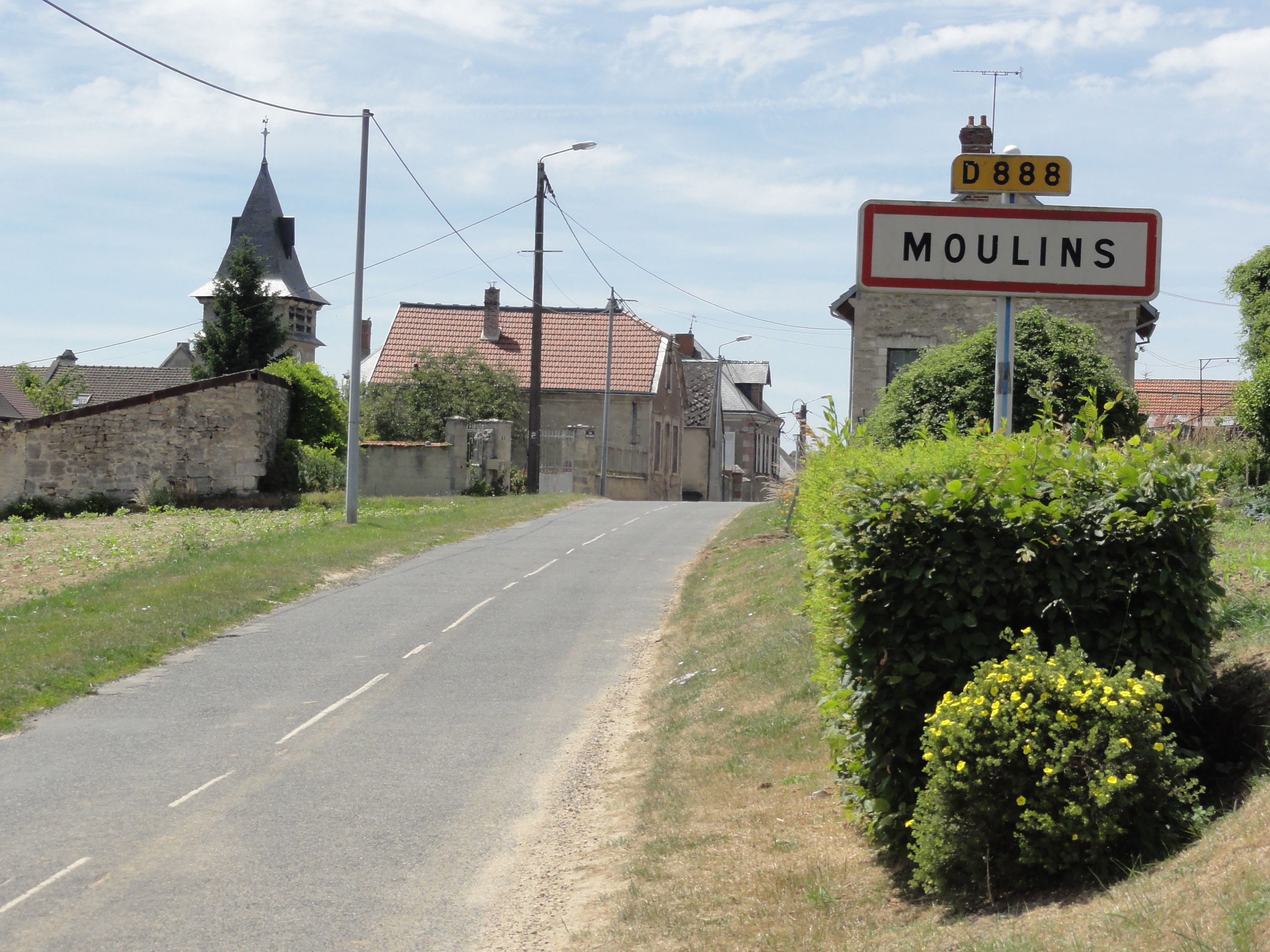 Moulins (Aisne) city limit sign